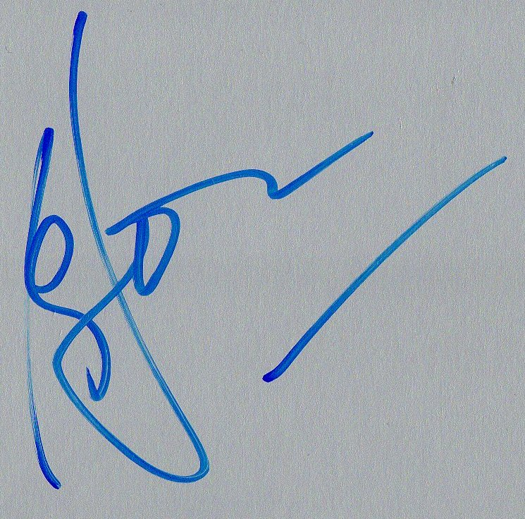 Autogramm von Eddie Jordan